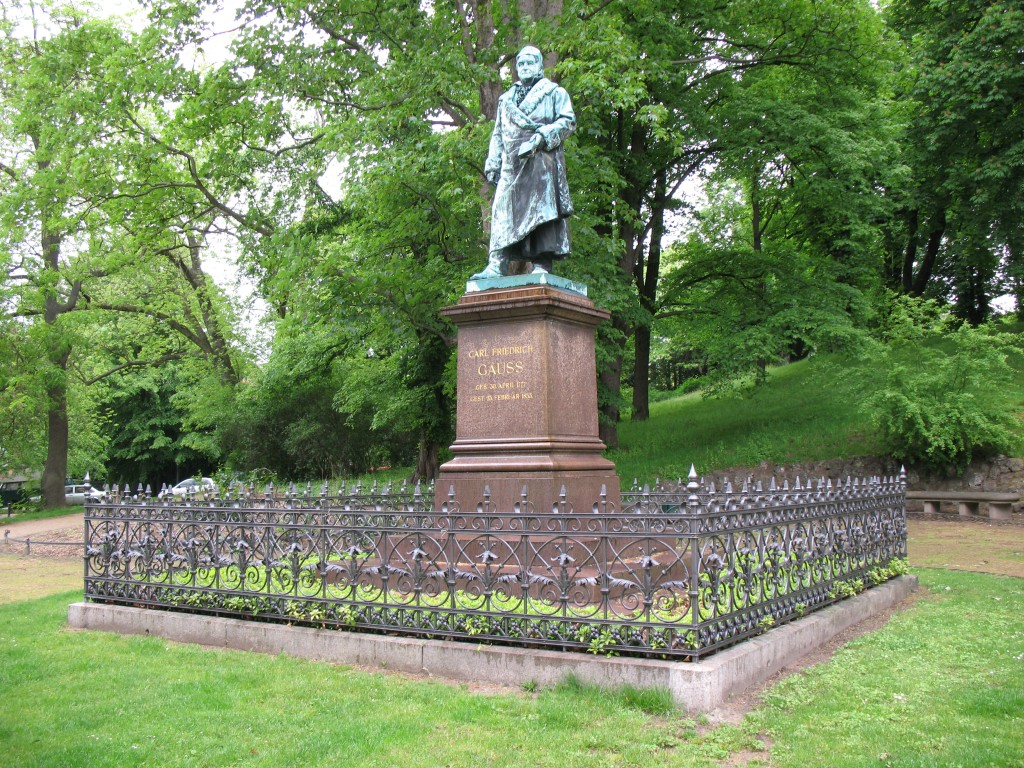 Statue of C. F. Gauss in Braunschweig